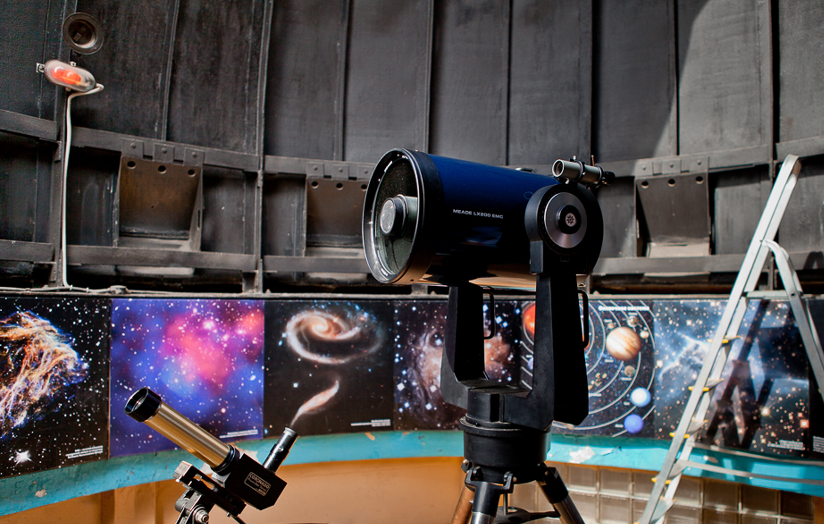 Планетарий имеет также свою небольшую астрономическую Обсерваторию, доступную для широкого круга посетителей.